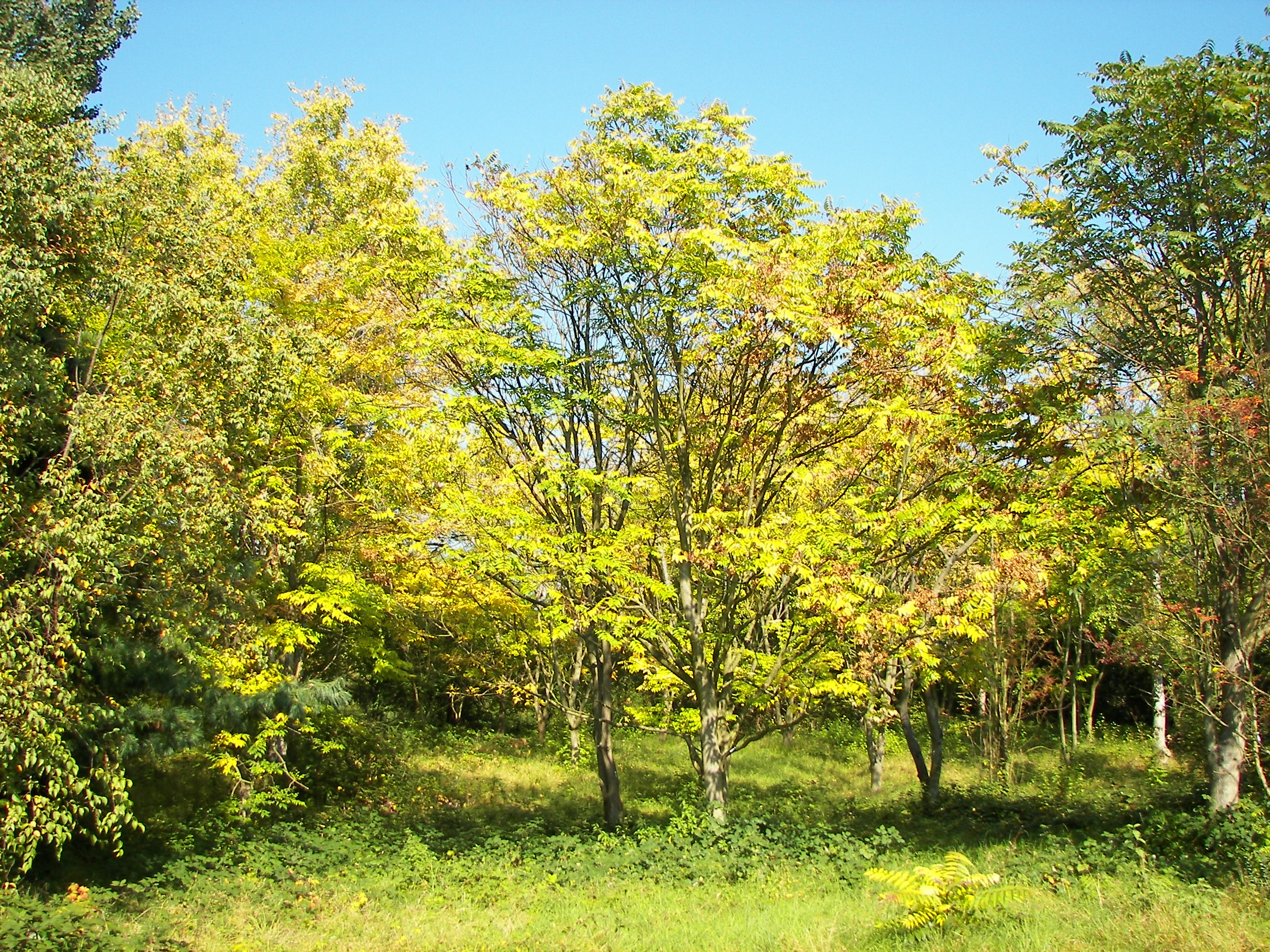 Surenbaum (Toona sinensis, syn. Cedrela sinensis) im Arboretum Main Taunus